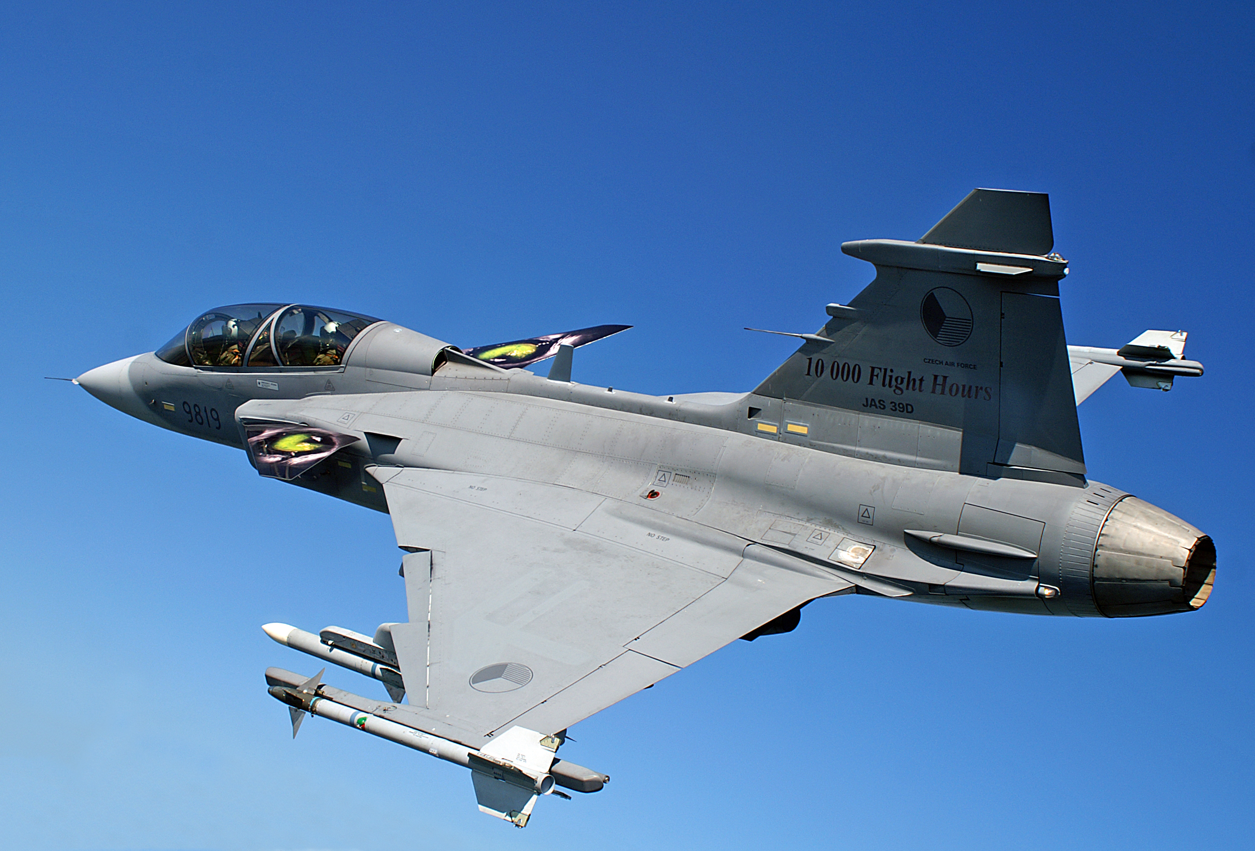 Saab JAS-39 Gripen (Czech Air Force) D version